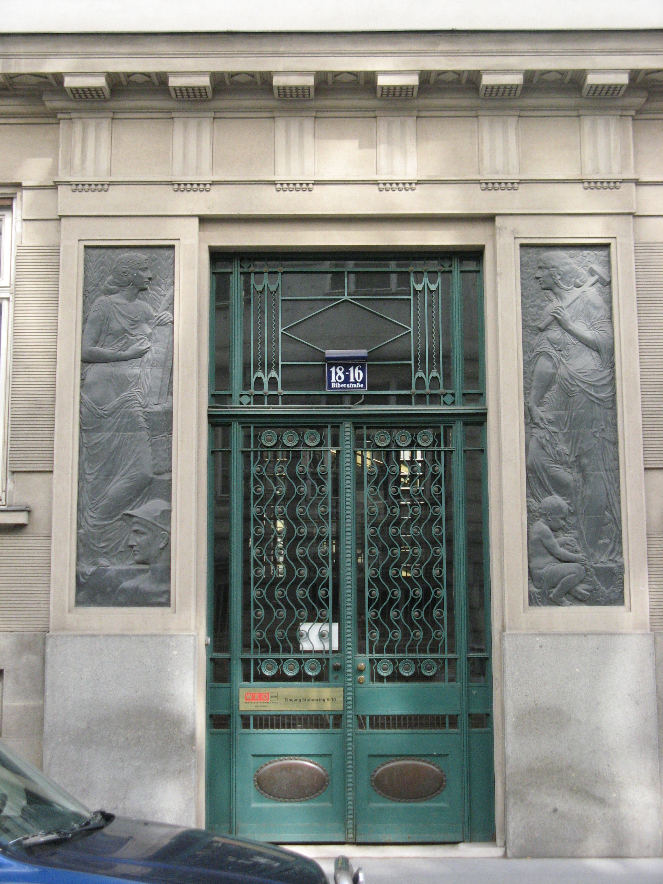 Portal mit Reliefs von Franz Seifert, ehemalige Handelskammer, Biberstraße 16-18, Wien-Innere Stadt